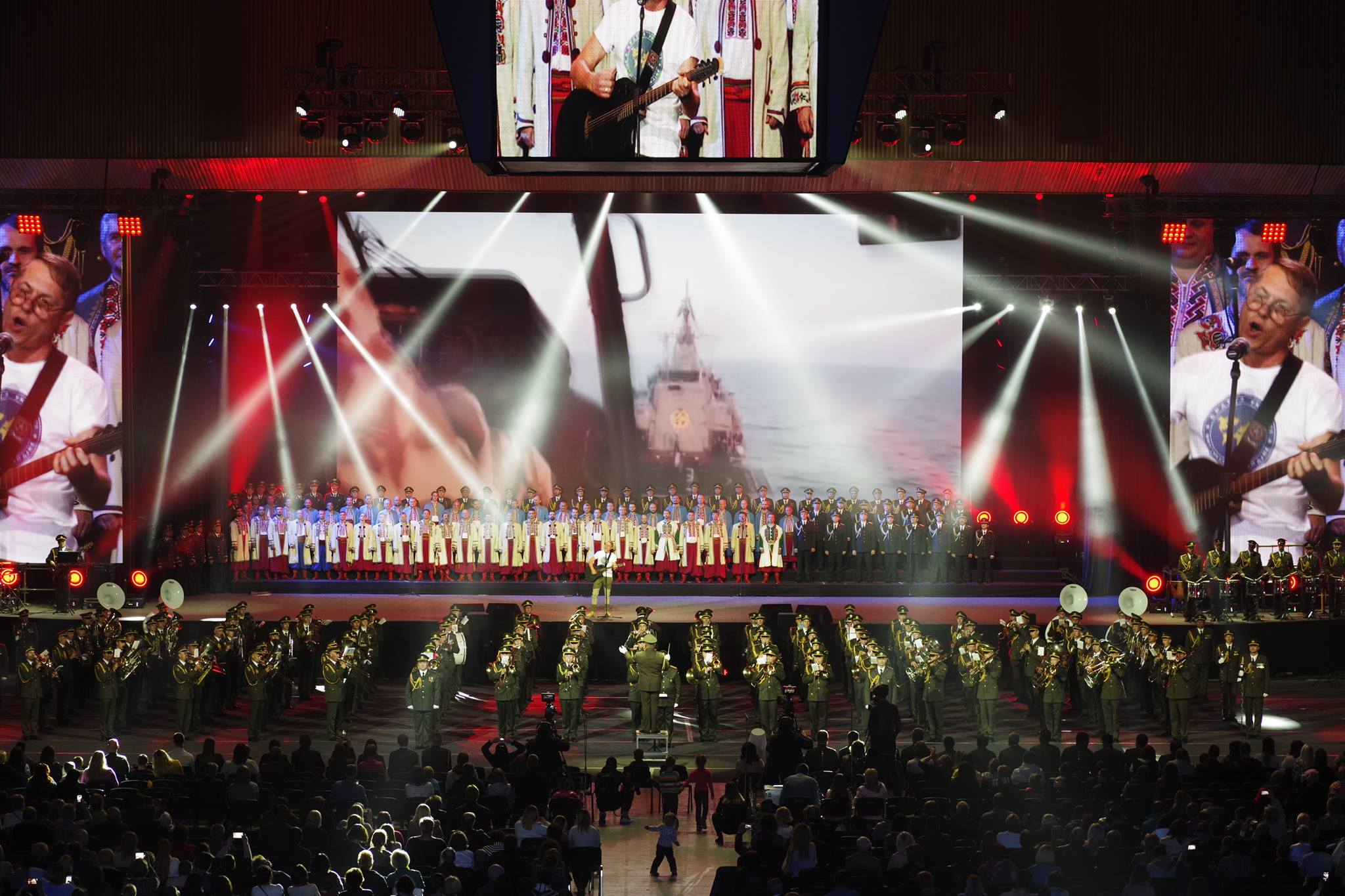 Вова Гейзер та Зведений оркестр та хор ЗСУ у Палаці Спорту виконують гімн АТО "Браття Українці"